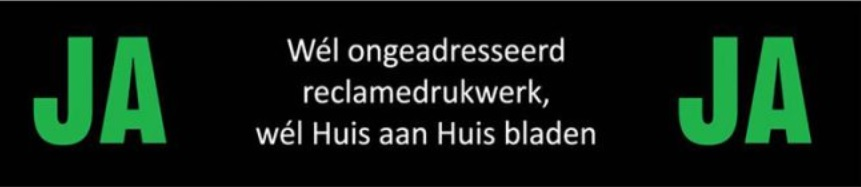 Ja-ja sticker